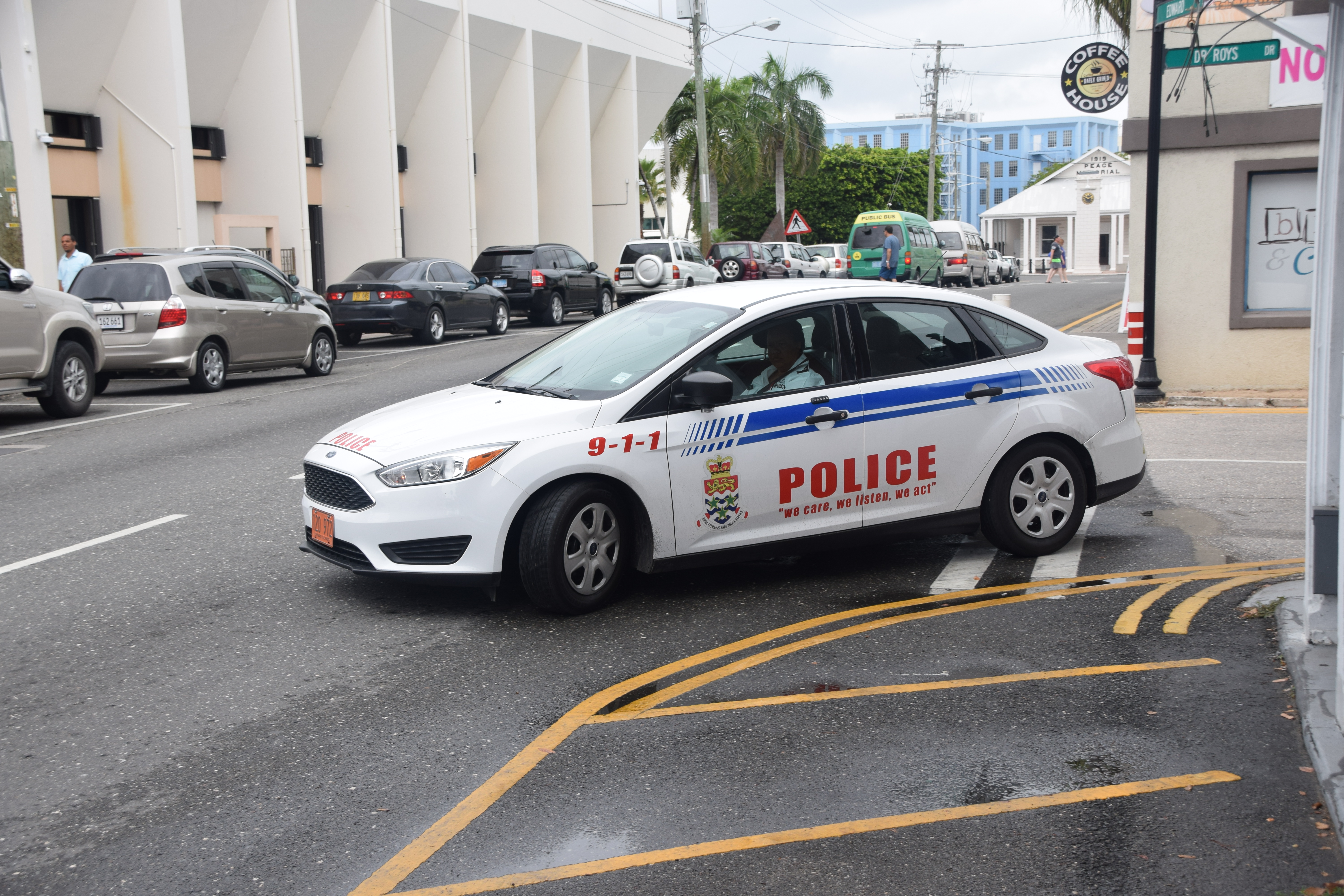 FORD Fusion - Politie auto op de Kaaimaneilanden